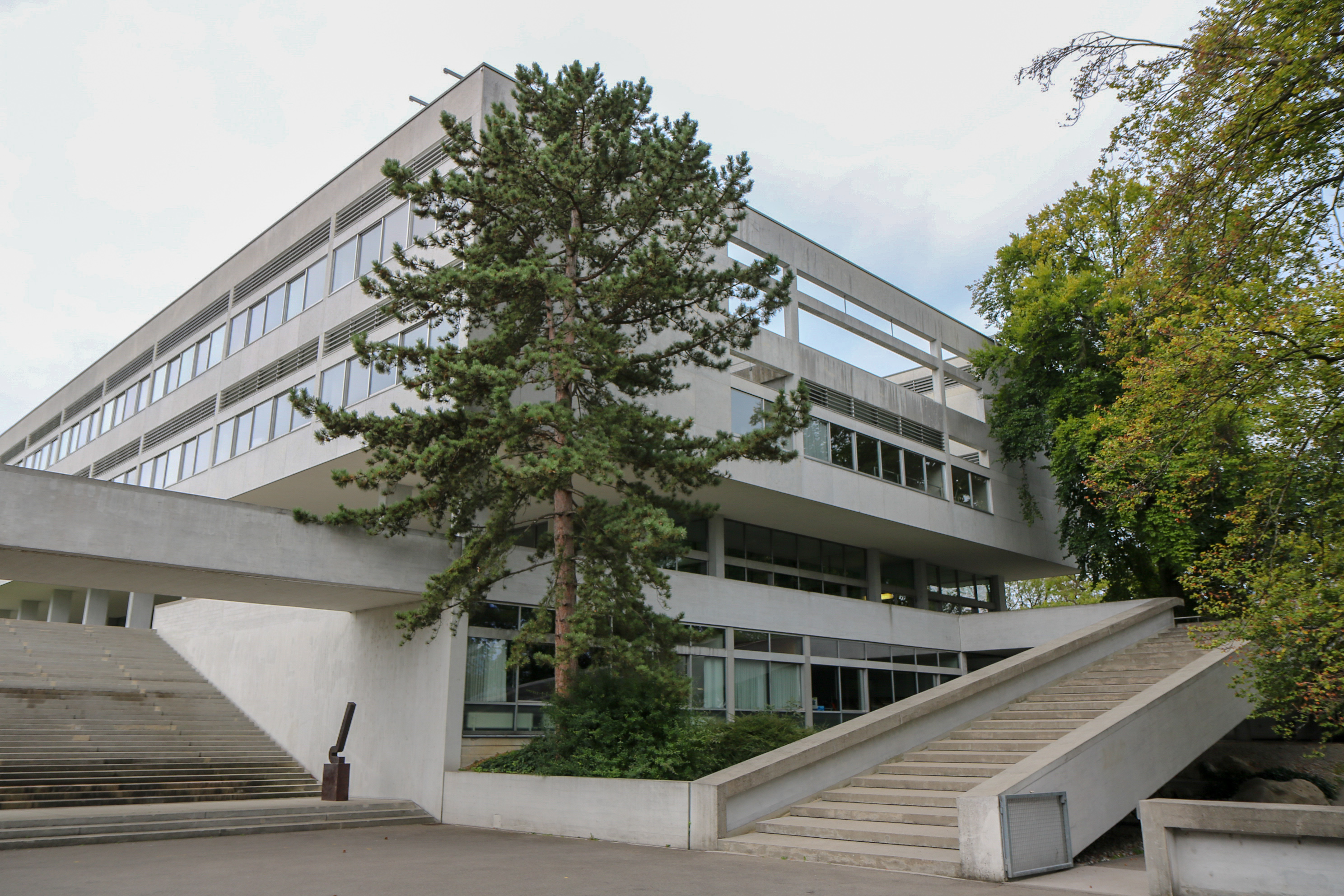 Bilder aus der Kantonsschulanlage Freudenberg-Enge 2018 - Blick auf das Schulhaus der Kantonsschule Enge